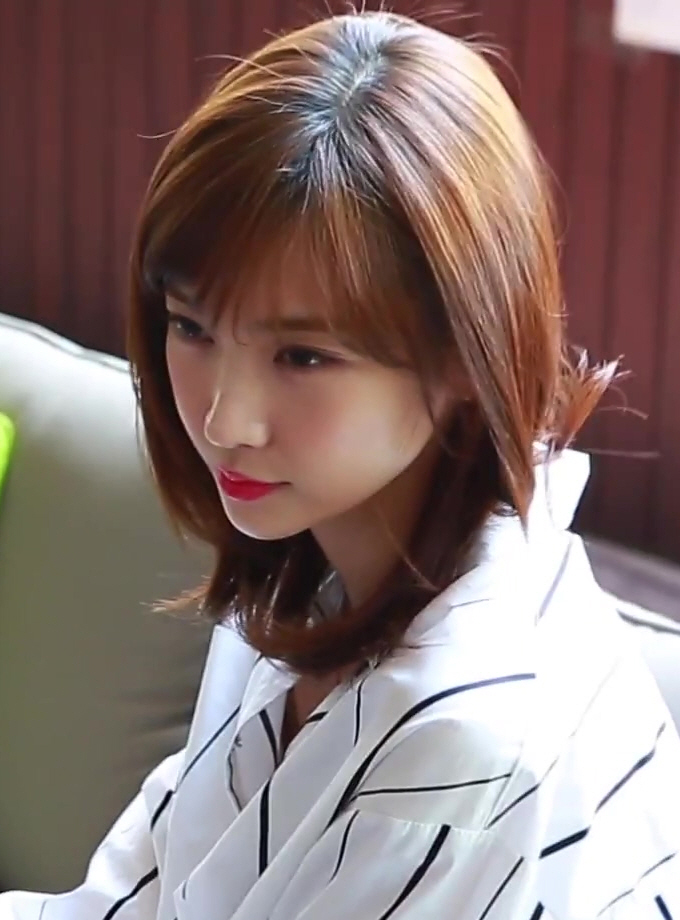 텐아시아 이해인 인터뷰 메이킹